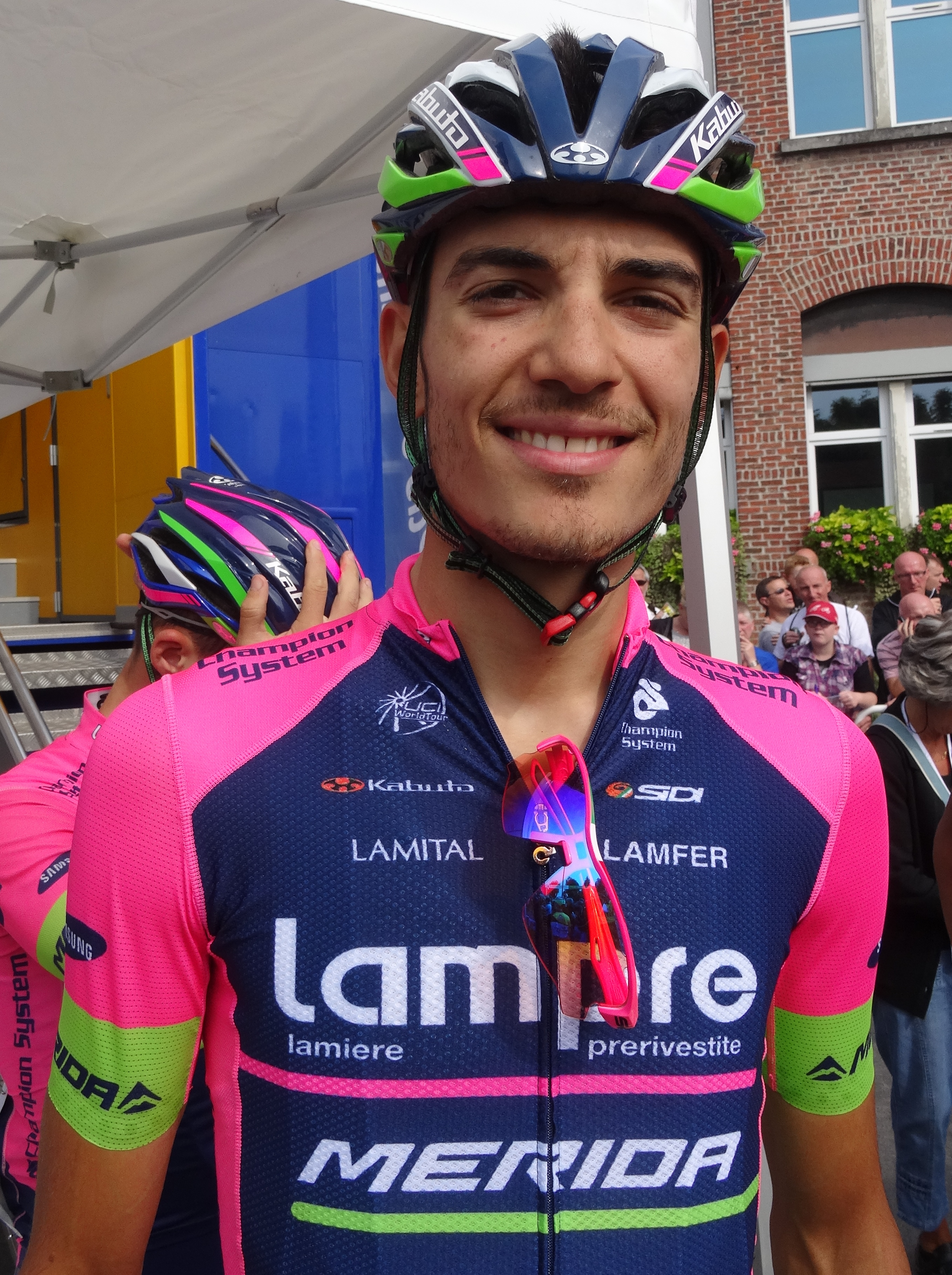 Reportage photographique réalisé le dimanche 7 septembre à l'occasion du départ et de l'arrivée du Grand Prix de Fourmies 2014 à Fourmies, Nord-Pas-de-Calais, France.